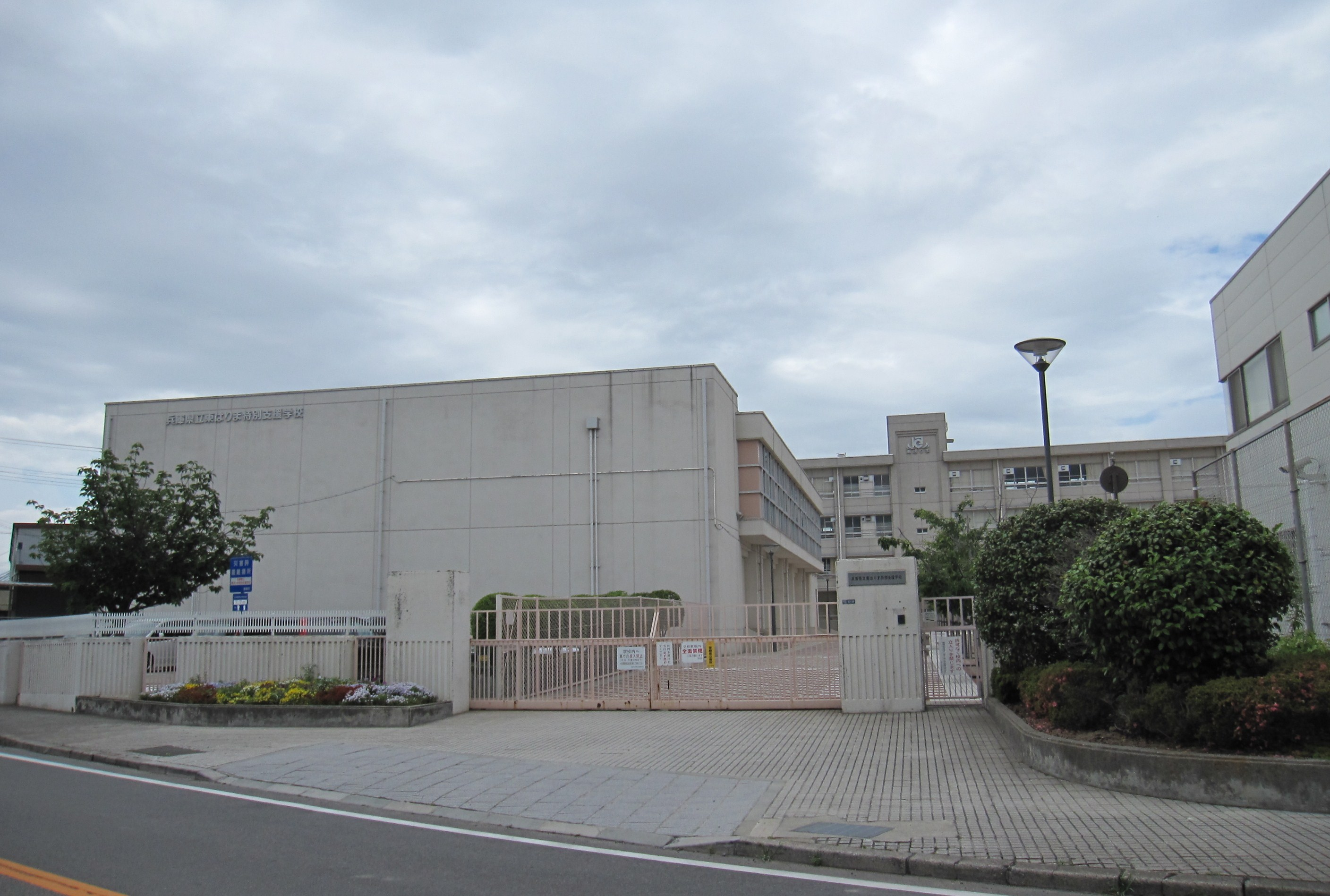 兵庫県立東はりま特別支援学校